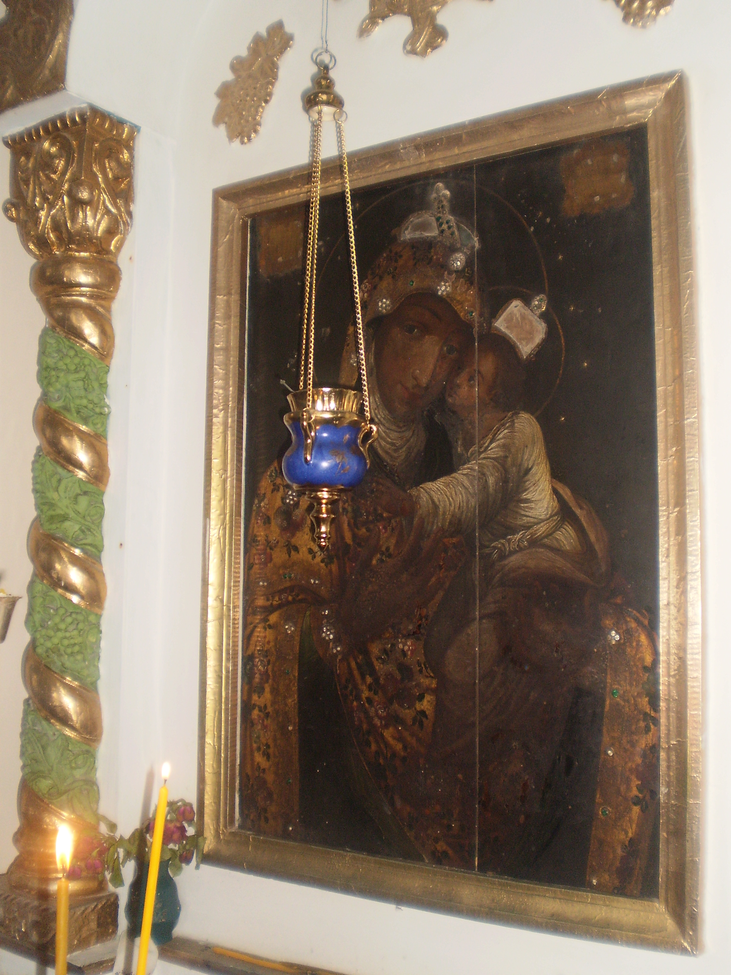 Воскресенська церква(мур.), Батурин